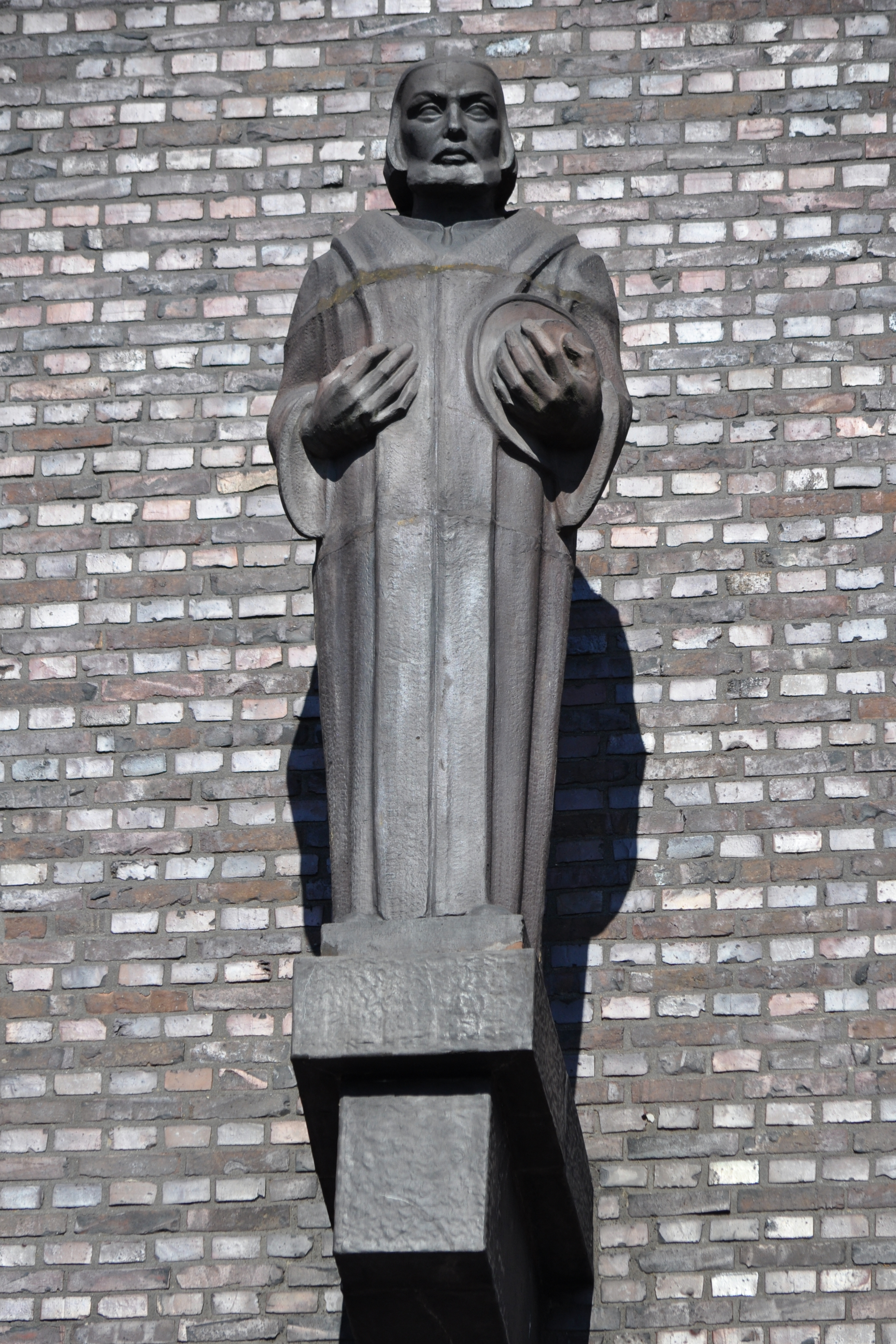 Klinker-Plastik Johann Wetken von Alphons Ely (1929) an der Bugenhagenkirche in Hamburg-Barmbek-Süd. This is a photograph of an architectural monument.